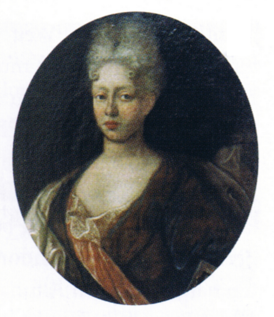 Anna Emerentia Gräfin von Reventlow aus dem Hause Altenhof (1680-1753), Priörin des Klosters von Uetersen